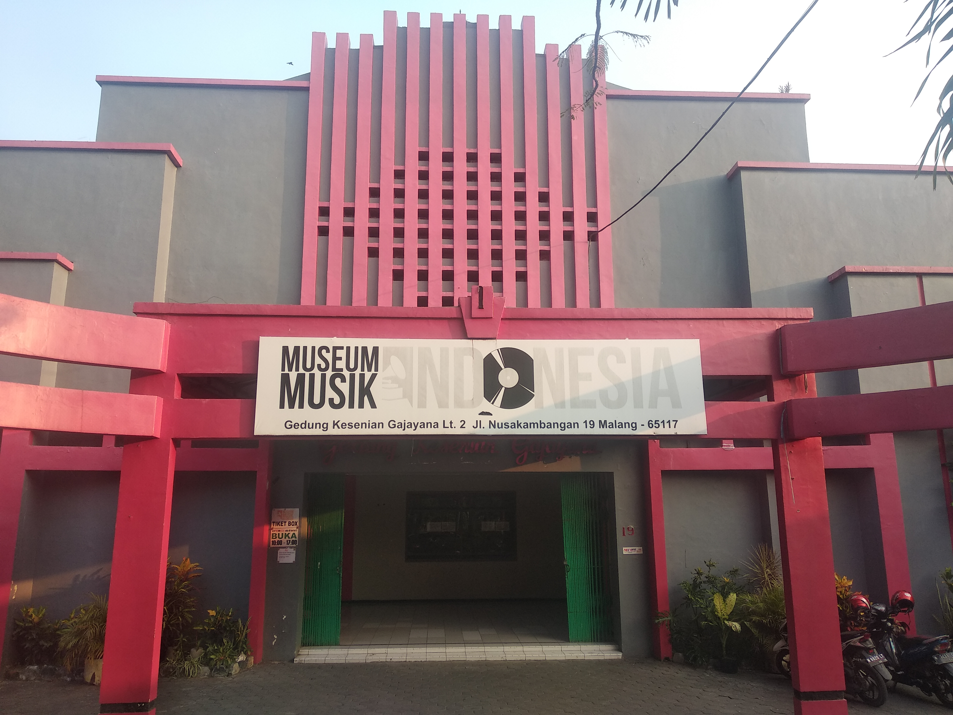 Tampilan depan Gedung Kesenian Gajayana di Jalan Nusakambangan, kota Malang